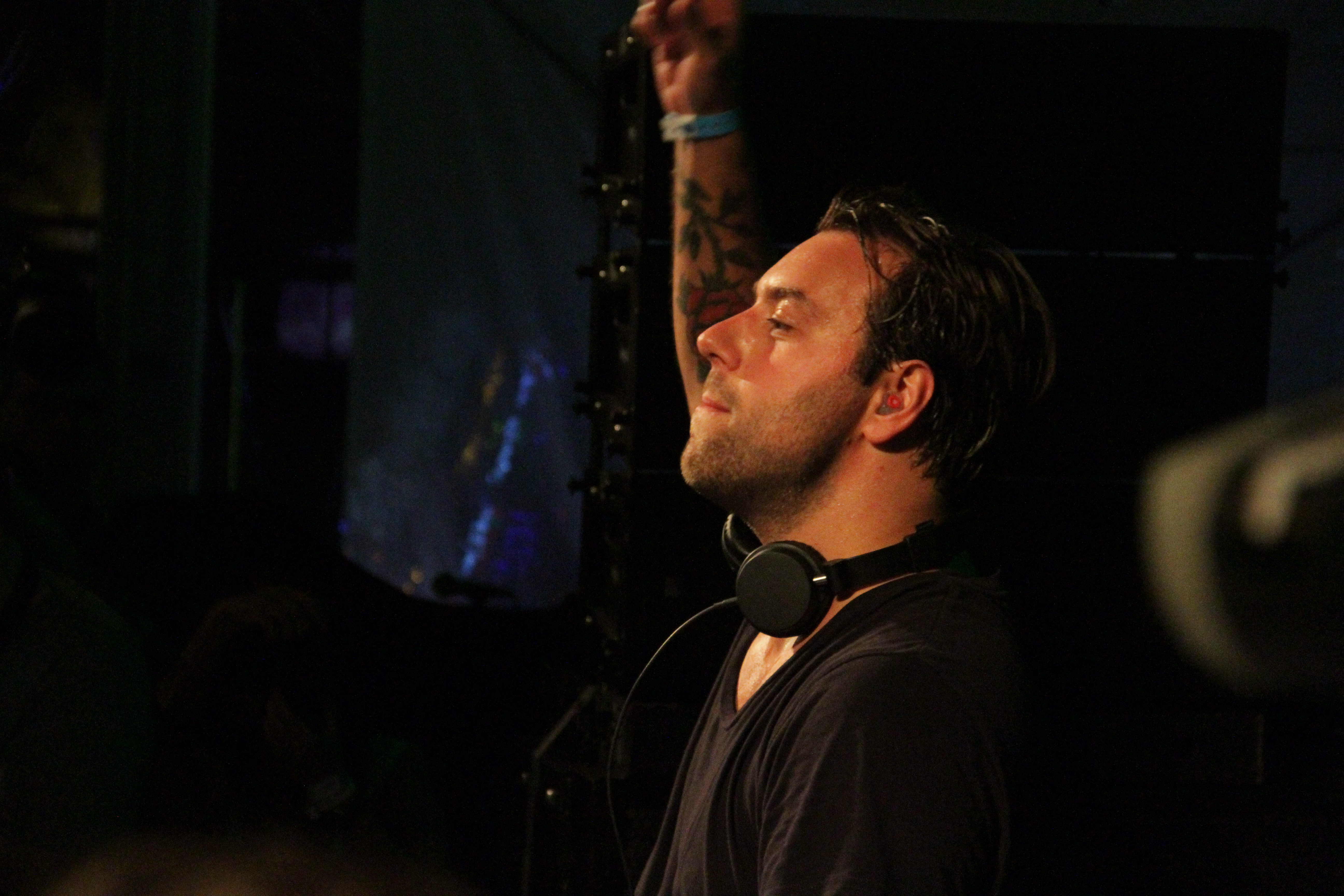 Sebastian Ingrosso auf dem Open Air Floor.